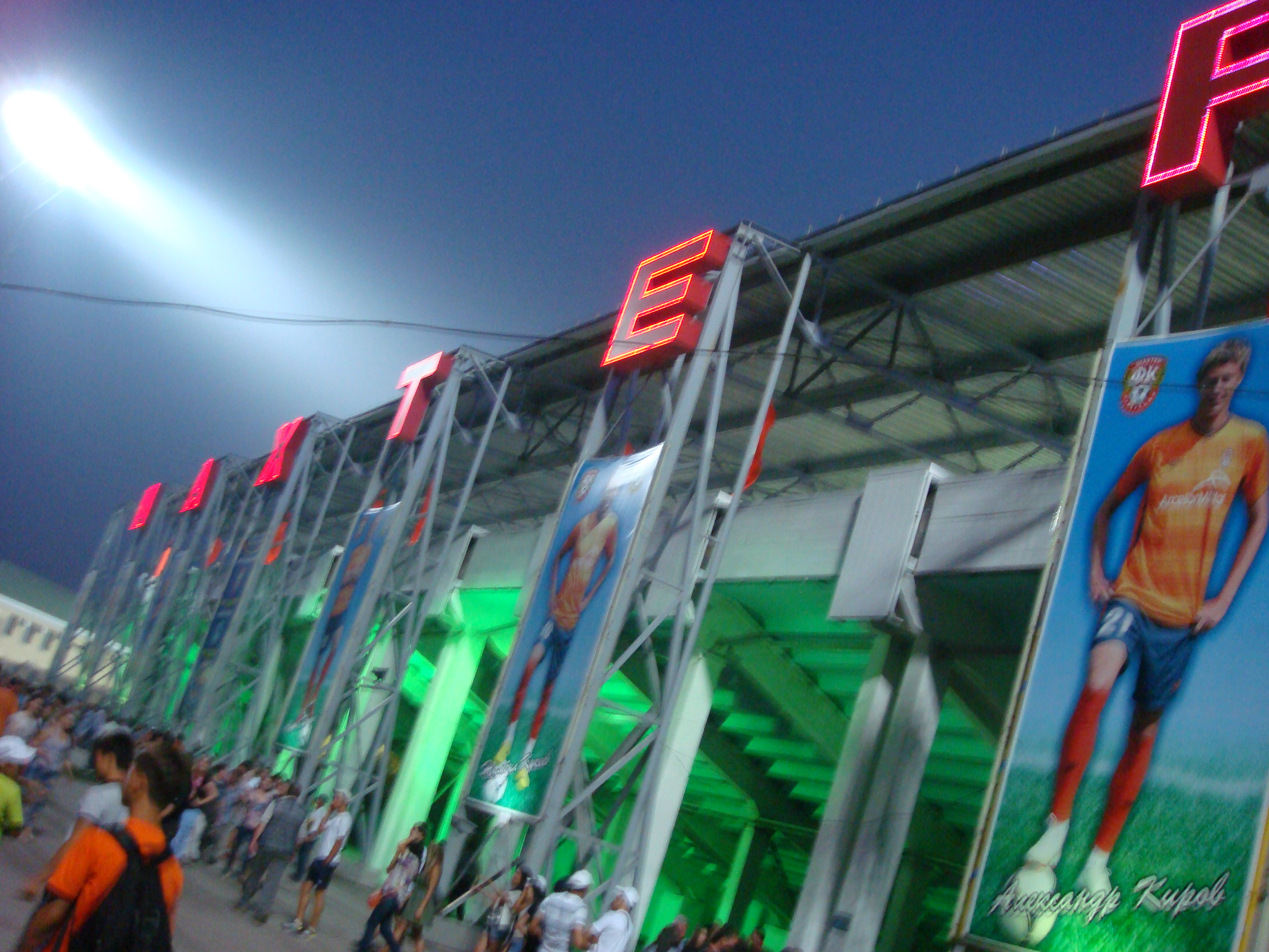 Стадион «Шахтёр» в Караганде